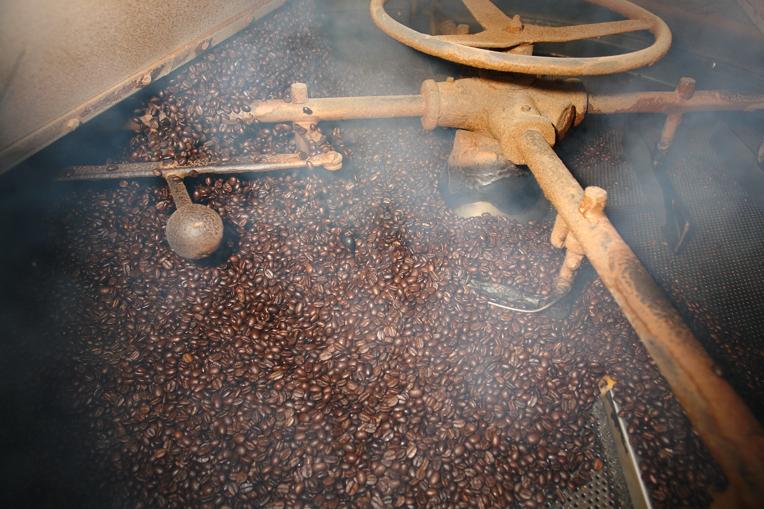 Kaffeerösterei Münchhausen in Bremen: Röstung fällt auf das Kühlsieb